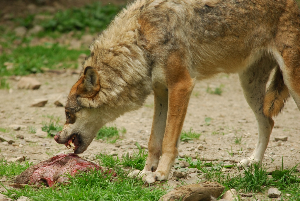 BOREON (06): ALPHA " Le temps du loup"